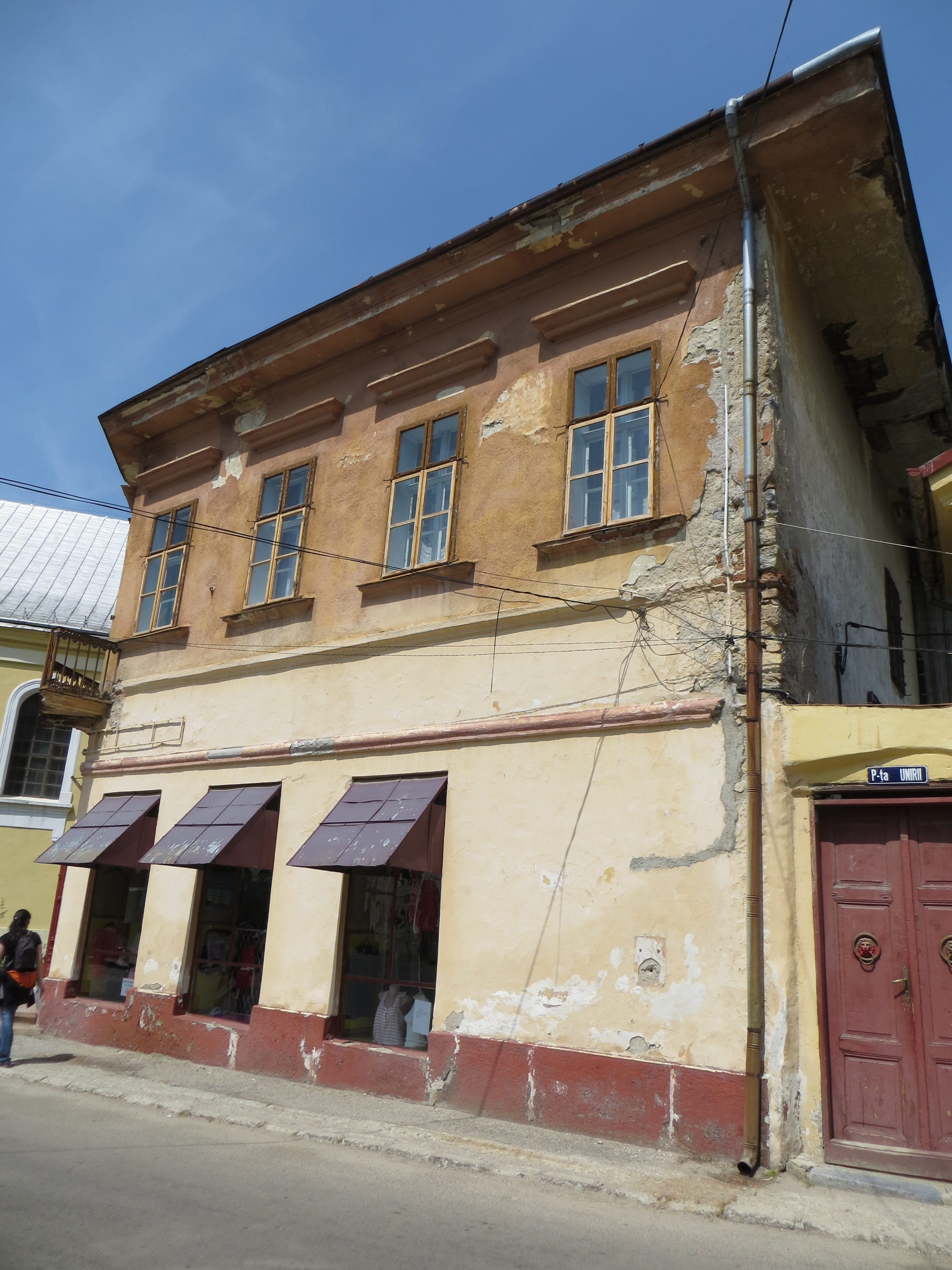 Casa Konkz, azi locuință șispațiu comercial